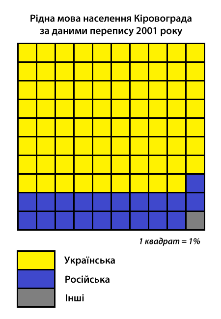 Інфографіка розподілу населення міста Кіровоград за рідною мовою згідно з даними перепису 2001 року. Джерело: Розподіл населення Кіровоградської області за рідною мовою (у % до загальної чисельності населення) за переписом 2001 року